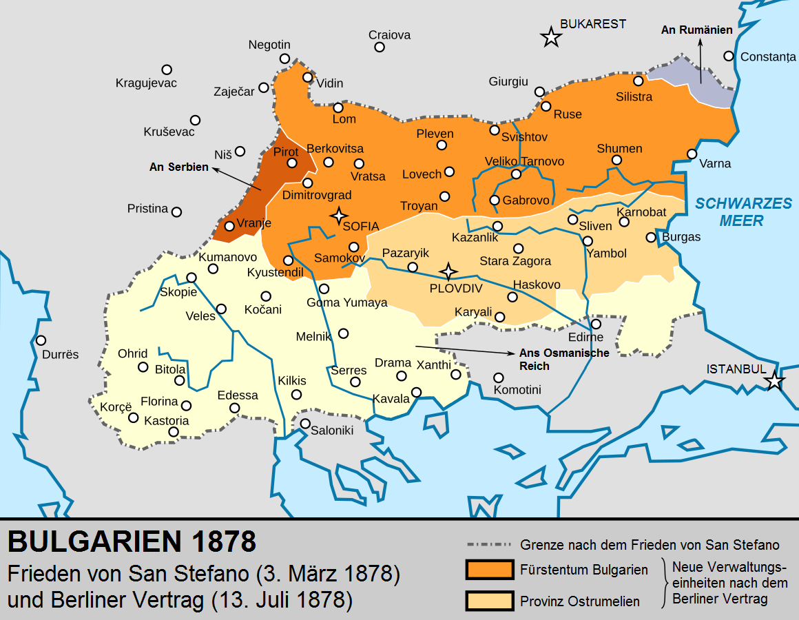 Grenzen Bulgariens nach dem Frieden von San Stefano (3. März 1878) und Berliner Vertrag (13. Juli 1878) Erstellt auf der Grundlage der Datei File:FronterasDeBulgariaSegúnSanStefanoYBerlín1878.svg